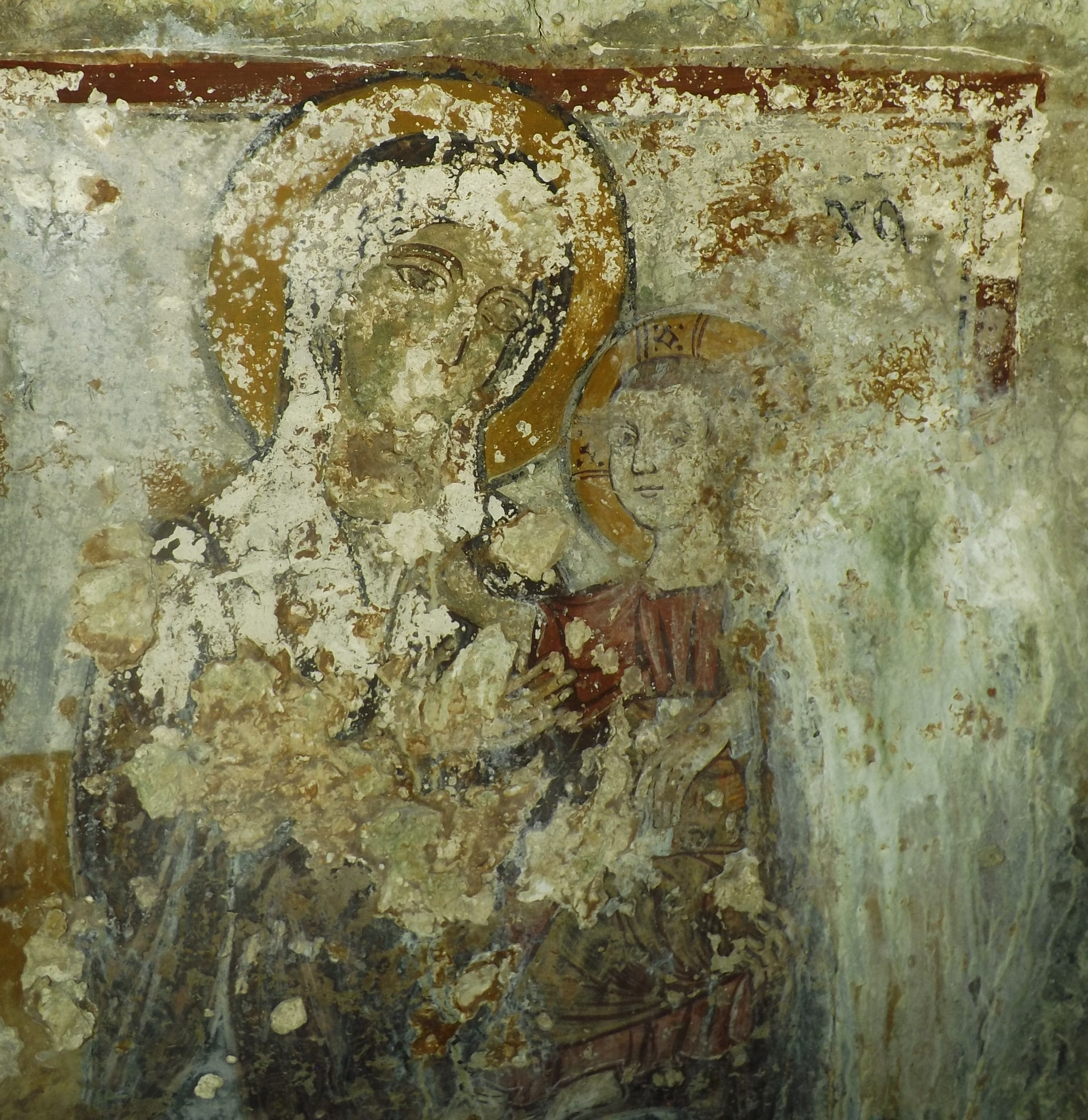 Affresco di una Madonna col Bambino, grotta sant'Angelo, Lizzano.